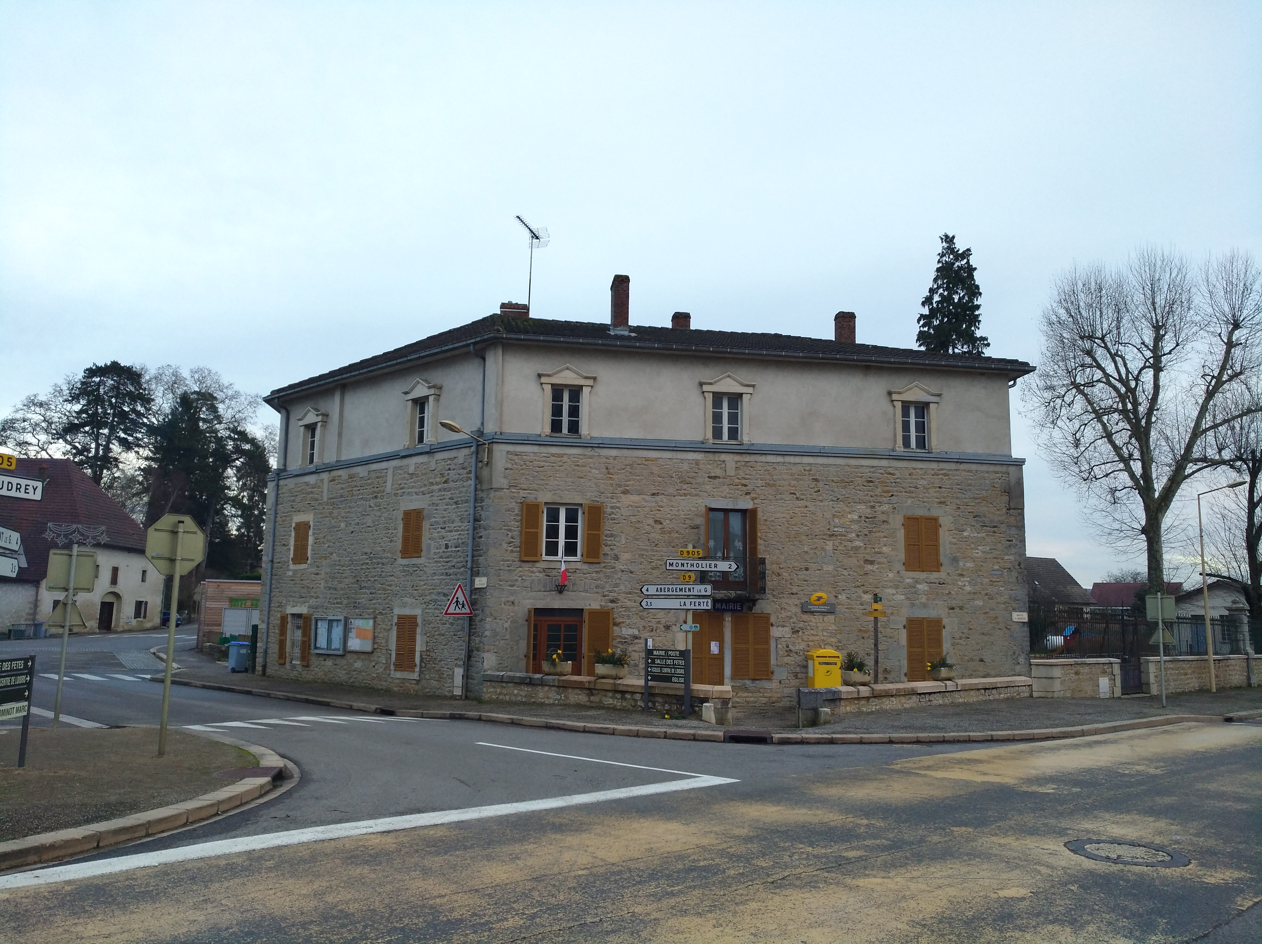 Aumont (Jura, France) en janvier 2018.